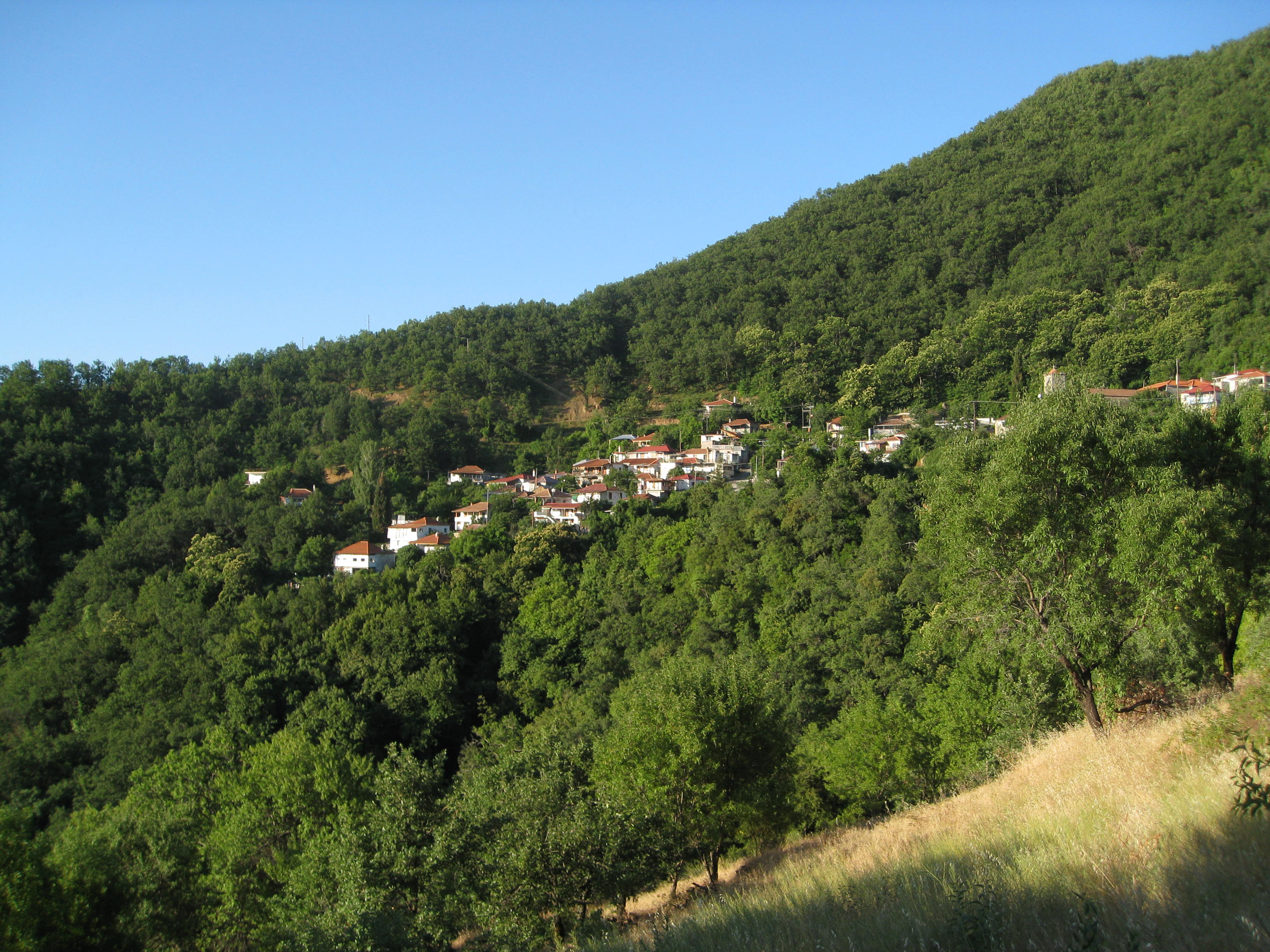 Άποψη του χωριού από την περιοχή "τα αλώνια".